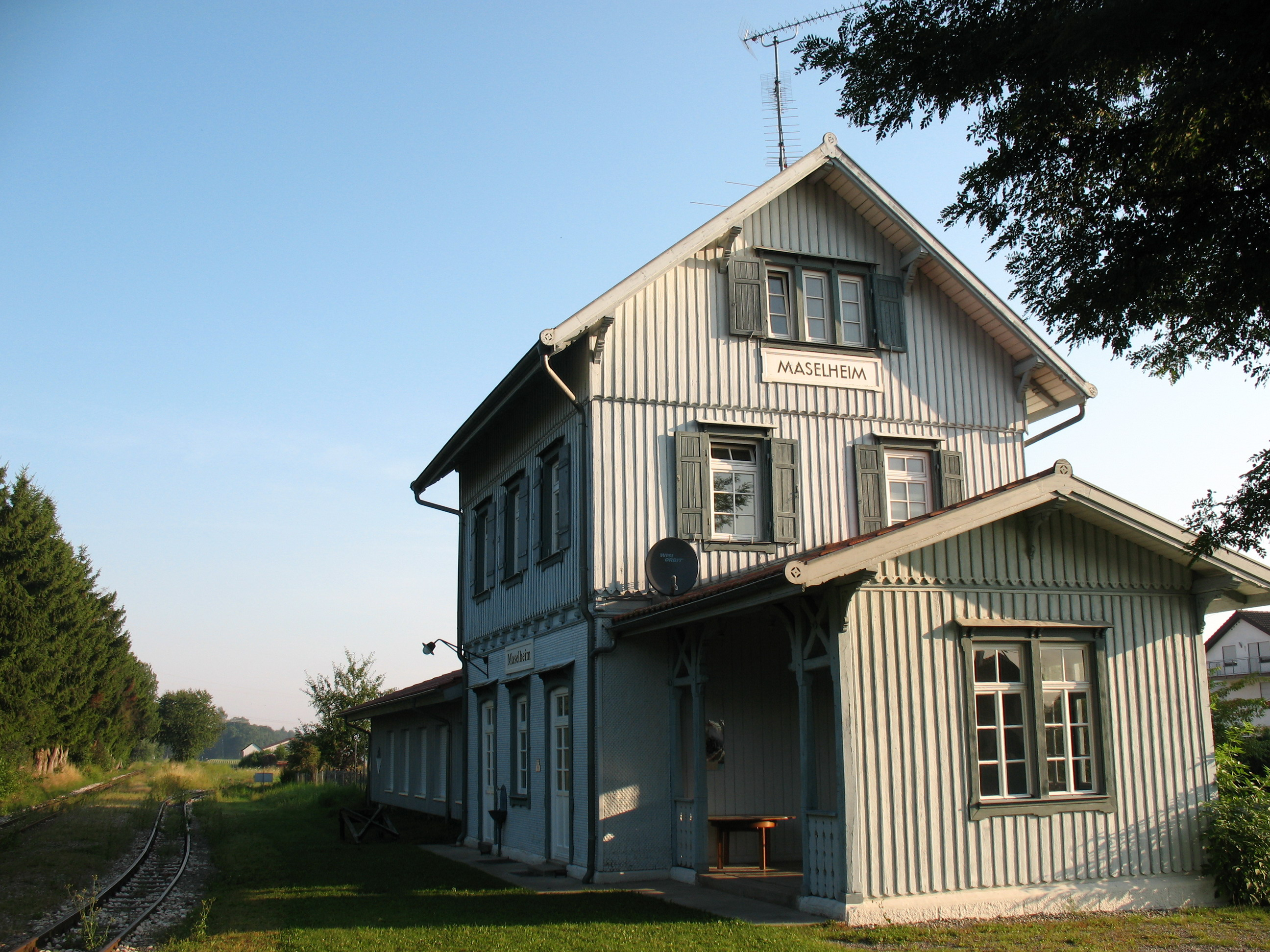 Bahnhof der Öchslebahn in Maselheim